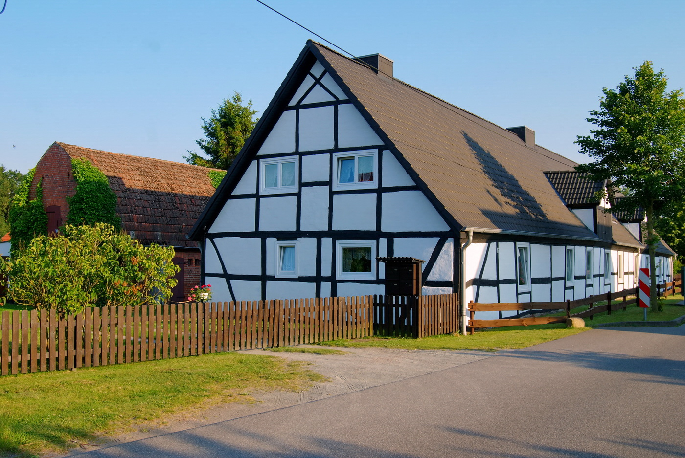 Typische Häuslerei in Gelbensande